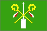 vlajka obce Rudimov